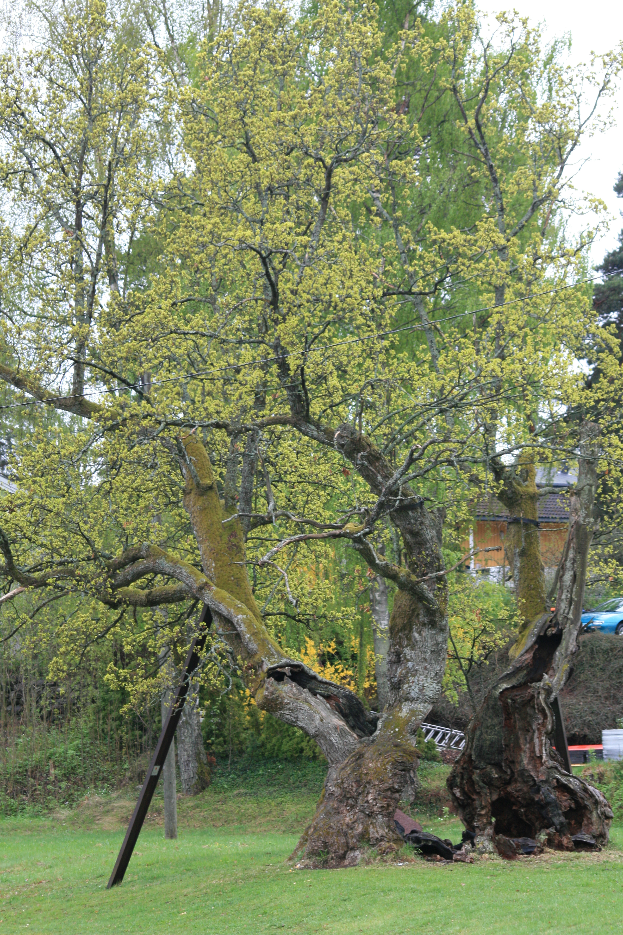 Tordenskioldeika